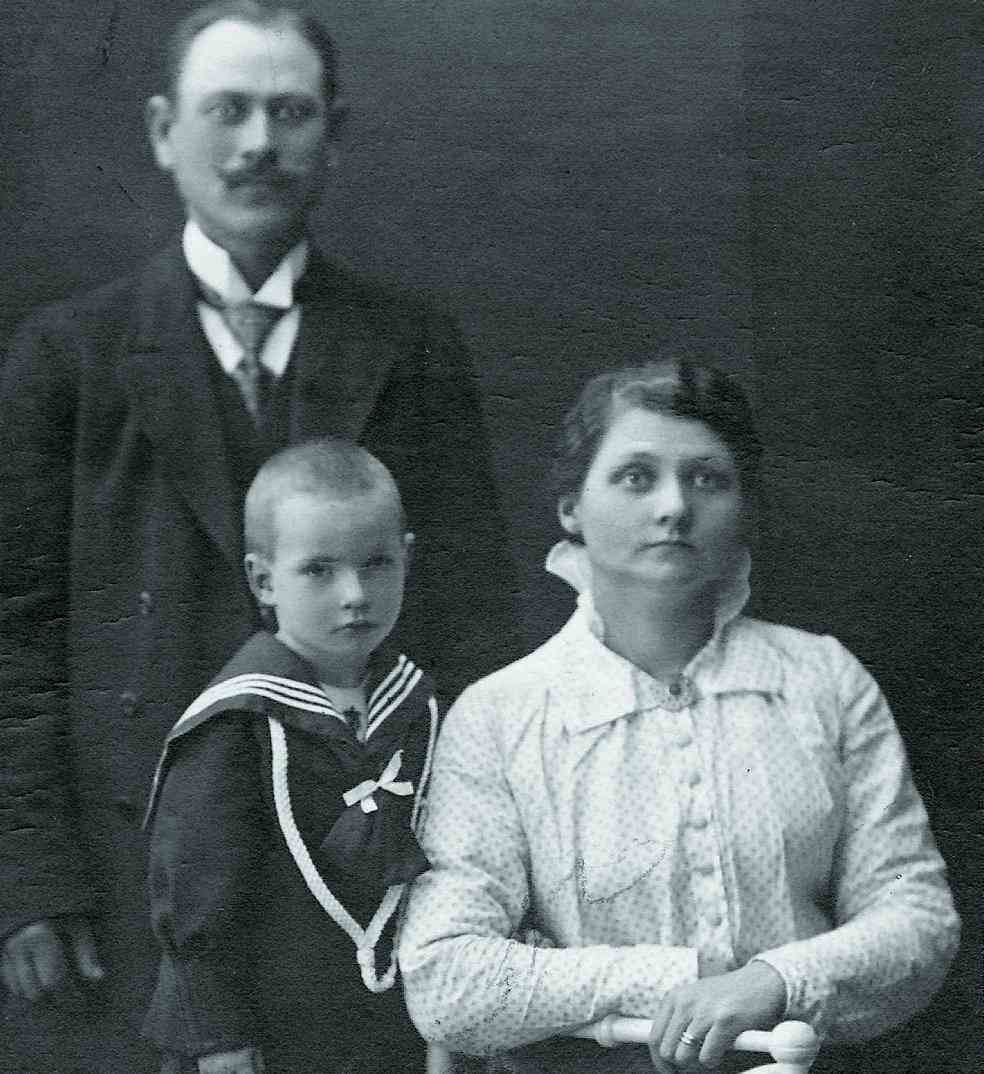 Hilda Nilsson, "änglamakerskan på Bruksgatan", här tillsammans med maken Gustaf och en pojke som kan vara Gustafs son eller ett av fosterbarnen som fick leva.